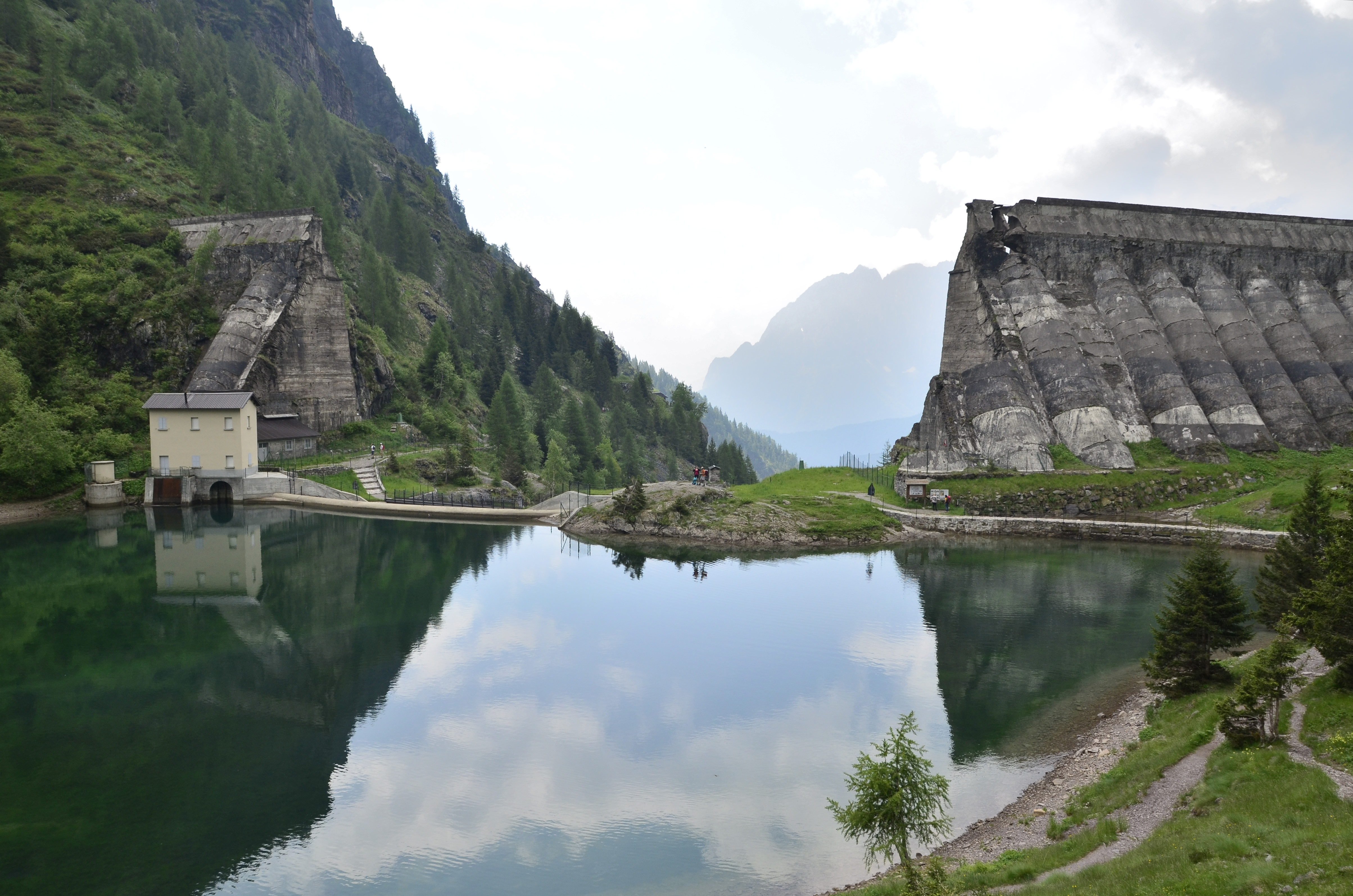 Rovine della diga del Gleno in Val di Scalve (Bg)